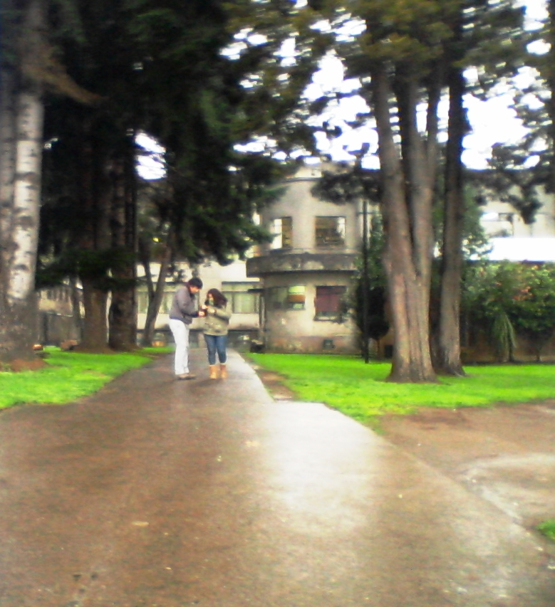 Campus San Francisco de la Universidad Católica de Temuco, Chile.